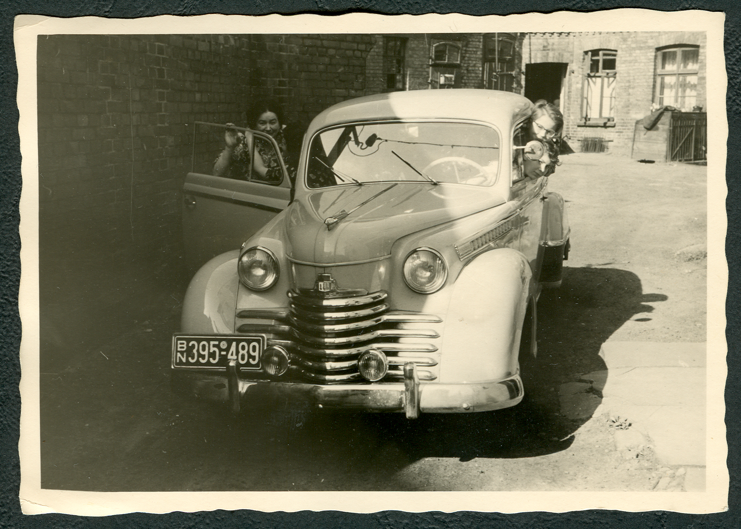 Anfang der 1950er Jahre: Blick durch die Hofeinfahrt der Villa Rosa in Hannover. Links neben dem Opel mit dem Bonner KFZ-Kennzeichen wird später die Firma von Neon Rosenkranz Leuchtreklame für Hannover und das Umland produzieren. Im Hintergrund ist das Erdgeschoss eines ehemaligen einfachen Arbeitwohn- und Miethauses zu sehen. Anders als für die Bewohner der eigentlichen Villa Rosa, deren Hauseingang gerade außerhalb rechts neben der Szenerie zu sehen wäre, gab es für die Mieter der Hofbebauung ein nur über den Hof zu erreichendes gemeinschaftliches Plumpsklo.